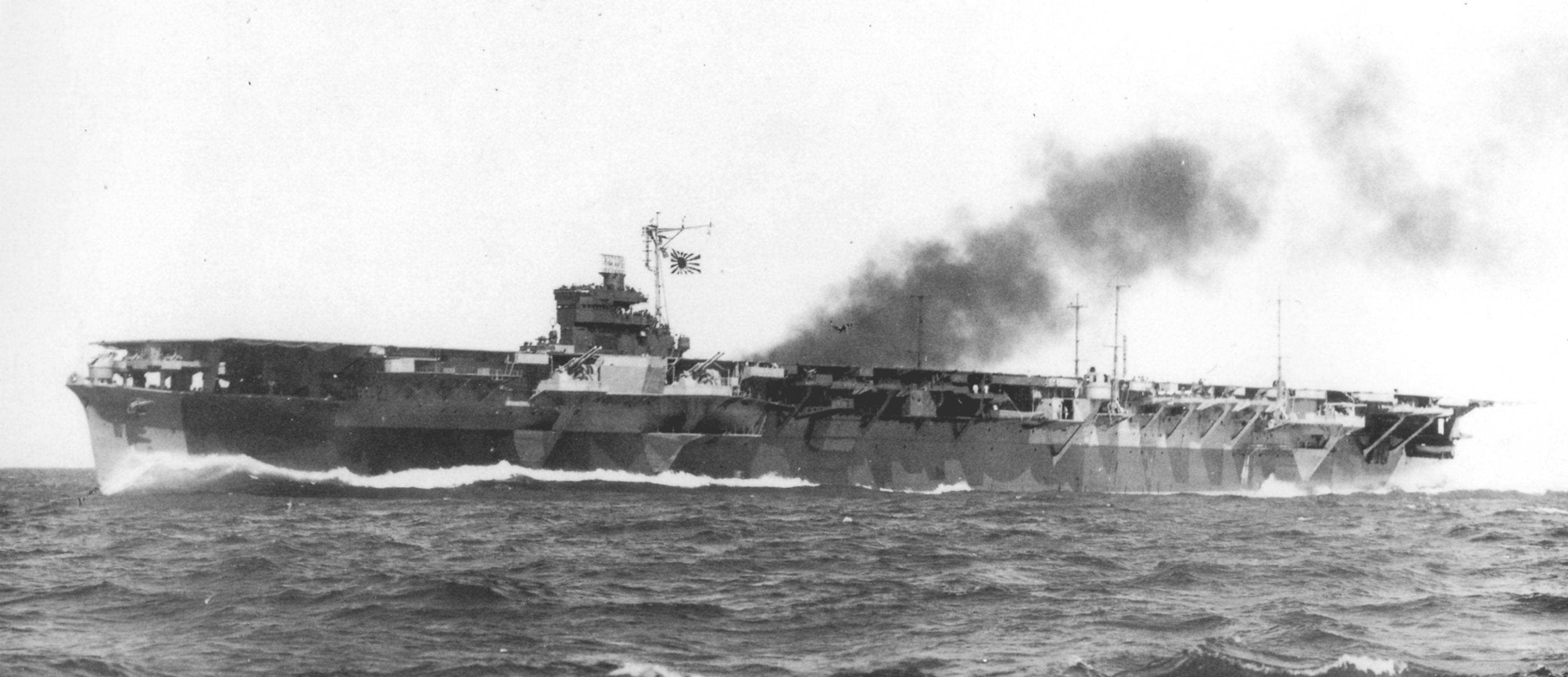 日本海軍航空母艦 雲龍型「葛城」鹿児島県佐多岬沖にて公試中の写真。